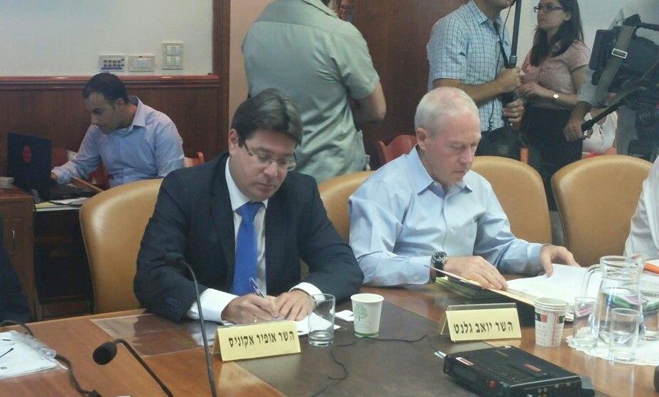 השר אופיר אקוניס בישיבת הממשלה ה-34, משרד ראש הממשלה, ירושלים